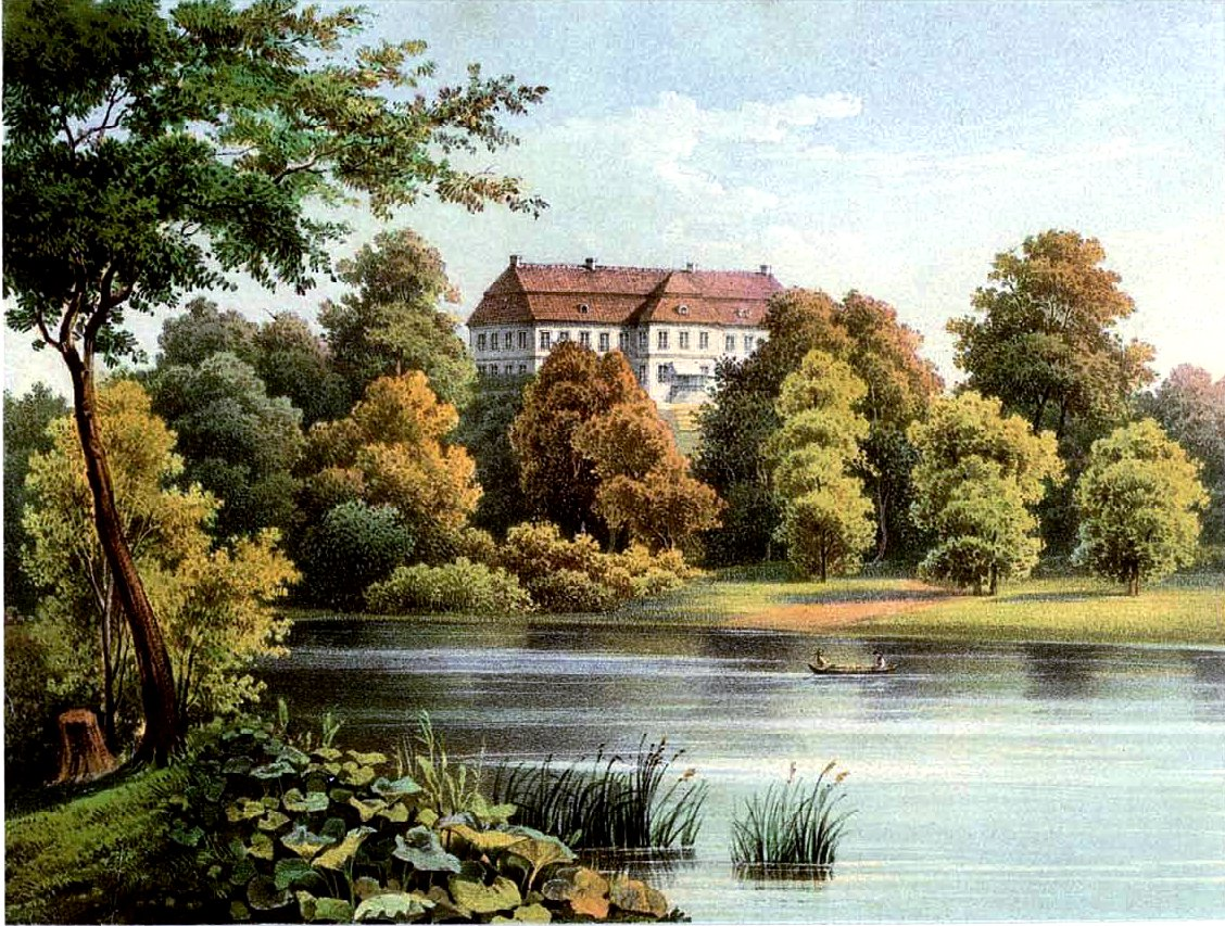 Schloss Wildenhoff, Kreis Preußisch Eylau, Provinz Preußen